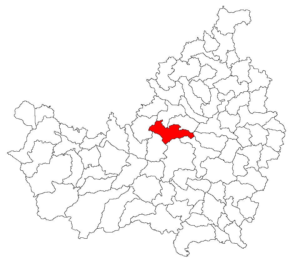 Categorie:Hărţi ale judeţului Cluj